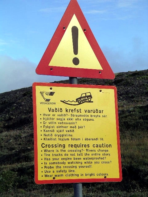 Auteur : Laurent Deschodt Description : un panneau précédant un passage à gué dans le Kerlingarfjöll, en Islande Traverser réclame de la prudence Où est le gué ? - Les rivières bougent Les traces de roue ne disent pas toute l'histoire Est-ce que votre moteur est water-proof ? Est-ce que quelqu'un vous regarde en train de traverser ? Testez la traversée par vous même Utilisez un filin de sécurité Portez des vêtements chauds de couleurs vives heu... Sommes nous vraiment obligés de passer par là ?